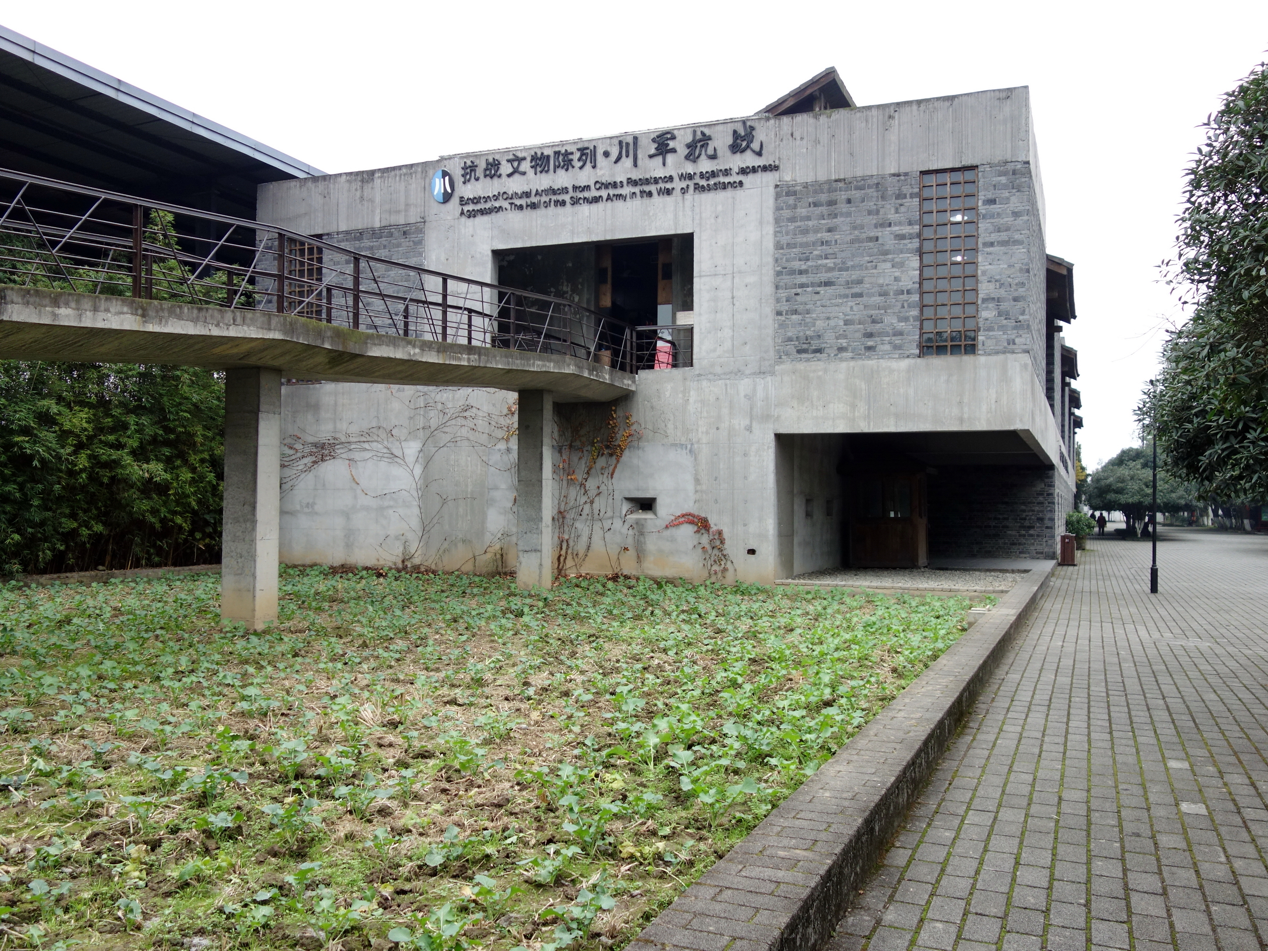 建川博物馆聚落川军抗战馆，纪念“30万川军出川抗战”、“300万壮丁奔赴抗战前线”的贡献。